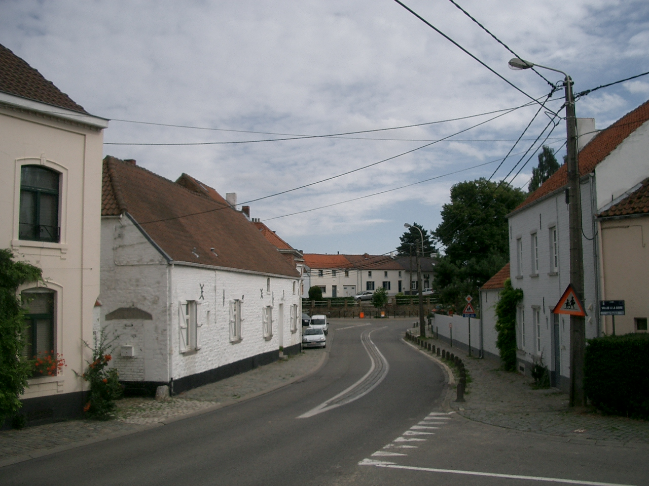 eigen werk Ruben Alexander